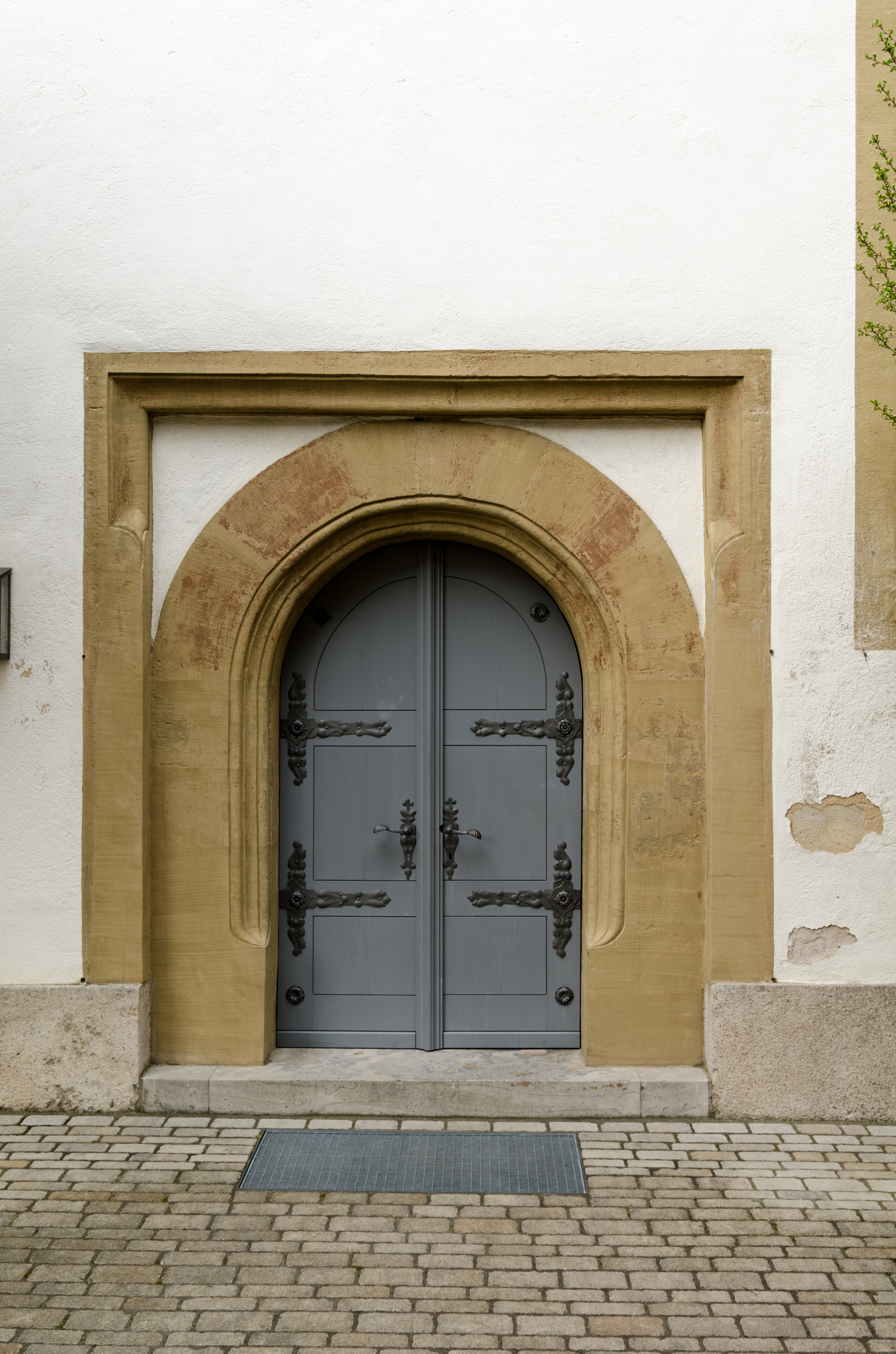 Buchbrunn, Evang.-lutherische Pfarrkirche